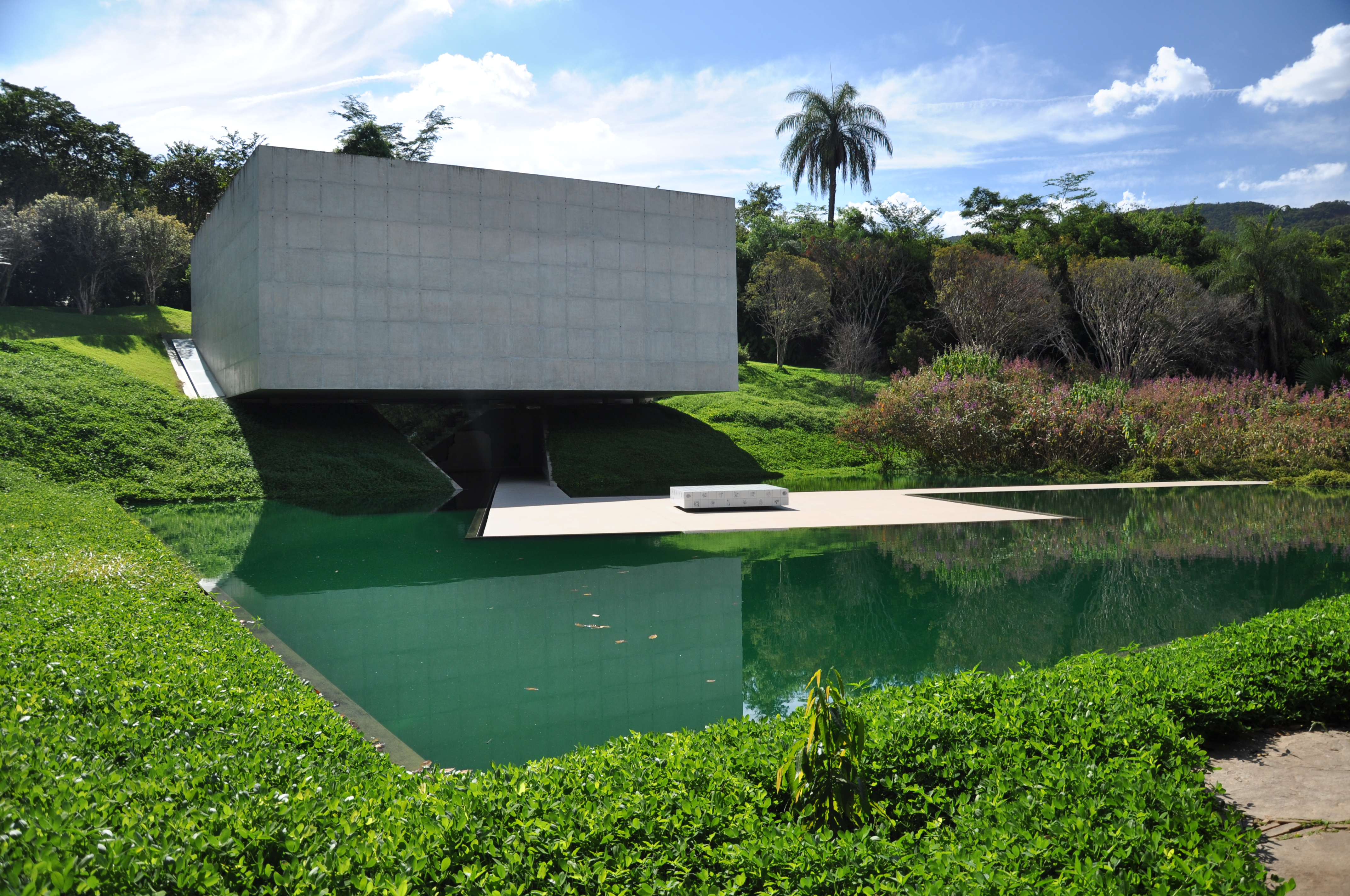 Adriana Varejão, Panacea Phantastica, 2003 – 2008, serigrafia sobre azulejo, 15,4 x 15,4 cm (cada peça), 40 cmx 202cm x 202 cm (instalação).